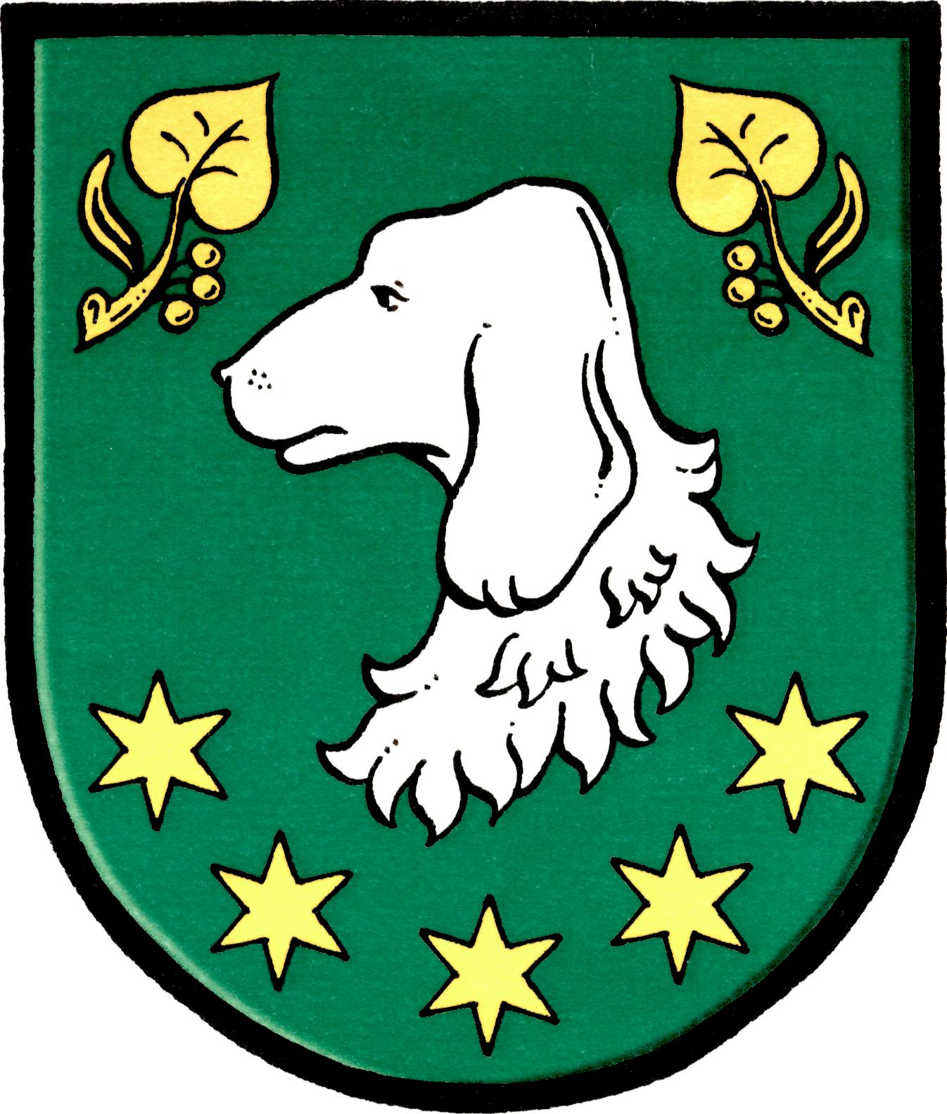 Znak obce Ohaře